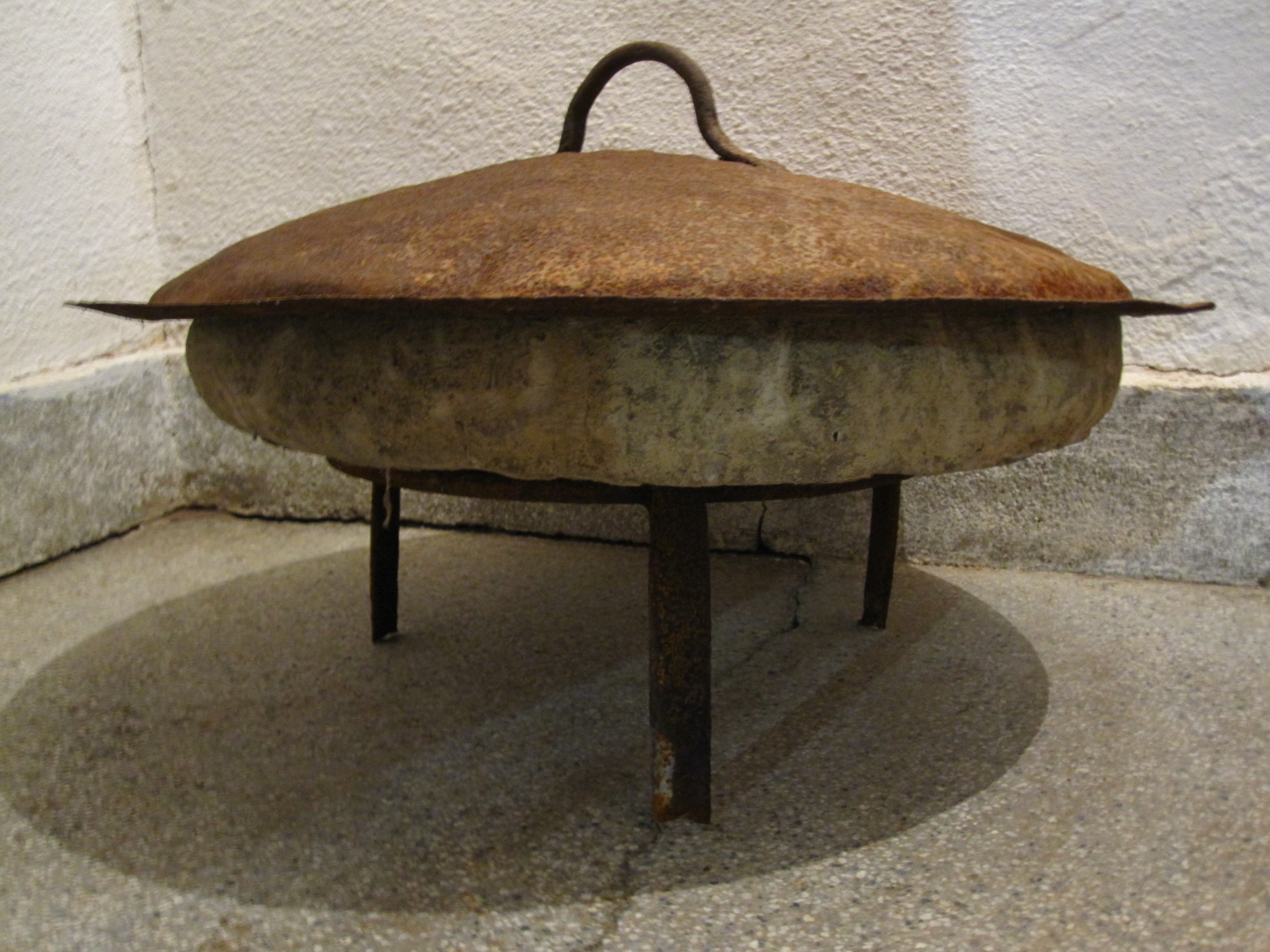 Црепна и вршник (сач) на пирустија.